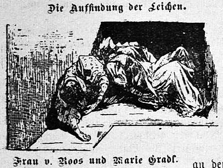 Karoline Roos geb. Alwens, Mordopfer, München, 1896, Auffindesituation in der Toilette Karlstr. 33, auf der toten Köchin liegend